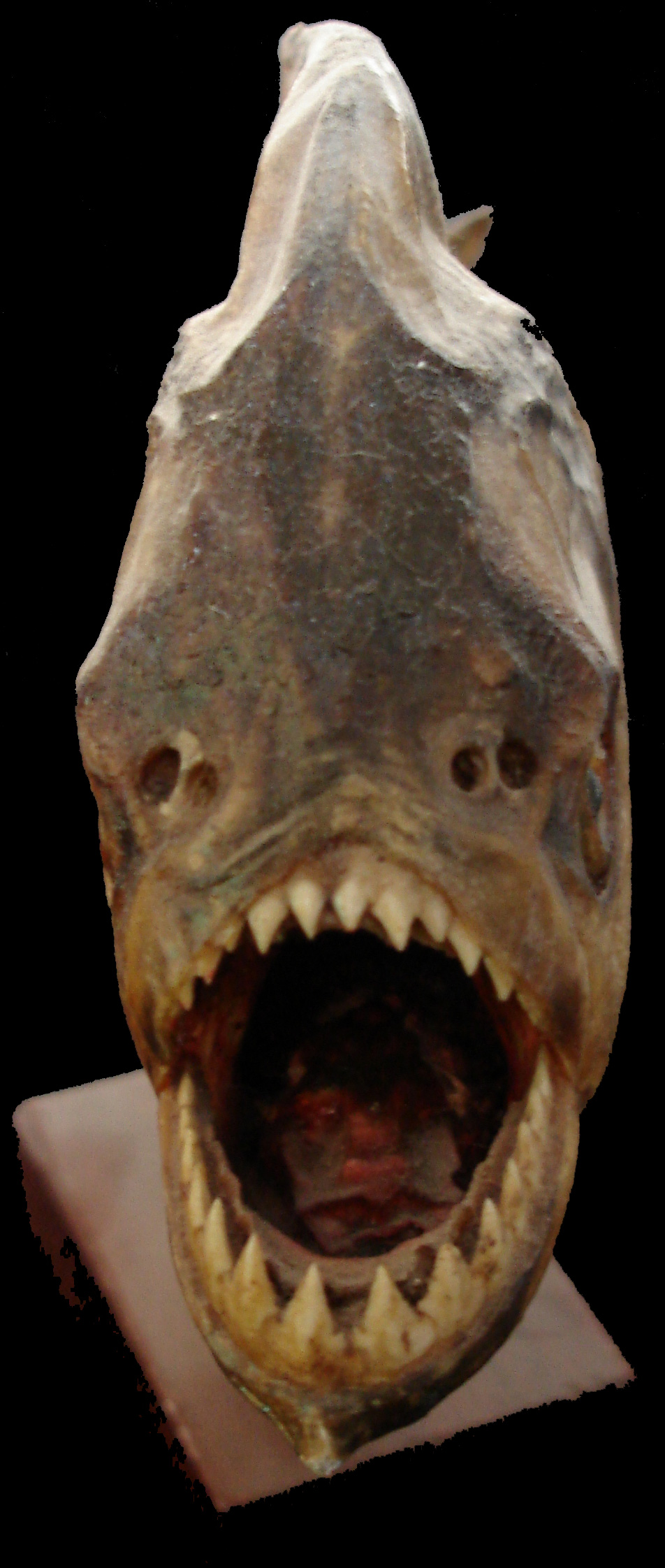 Piranha mort et sec de face